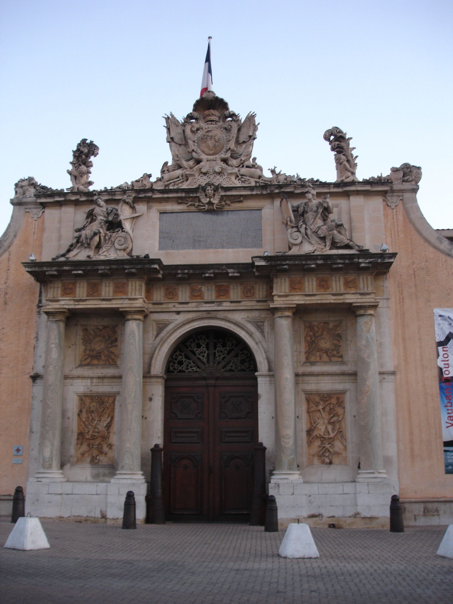 France, Var (83), Toulon, Musée nationale de la marine. Les sculptures sont de Jean-Michel Verdiguier (1706-1796) et de Jean Ange Maucord.